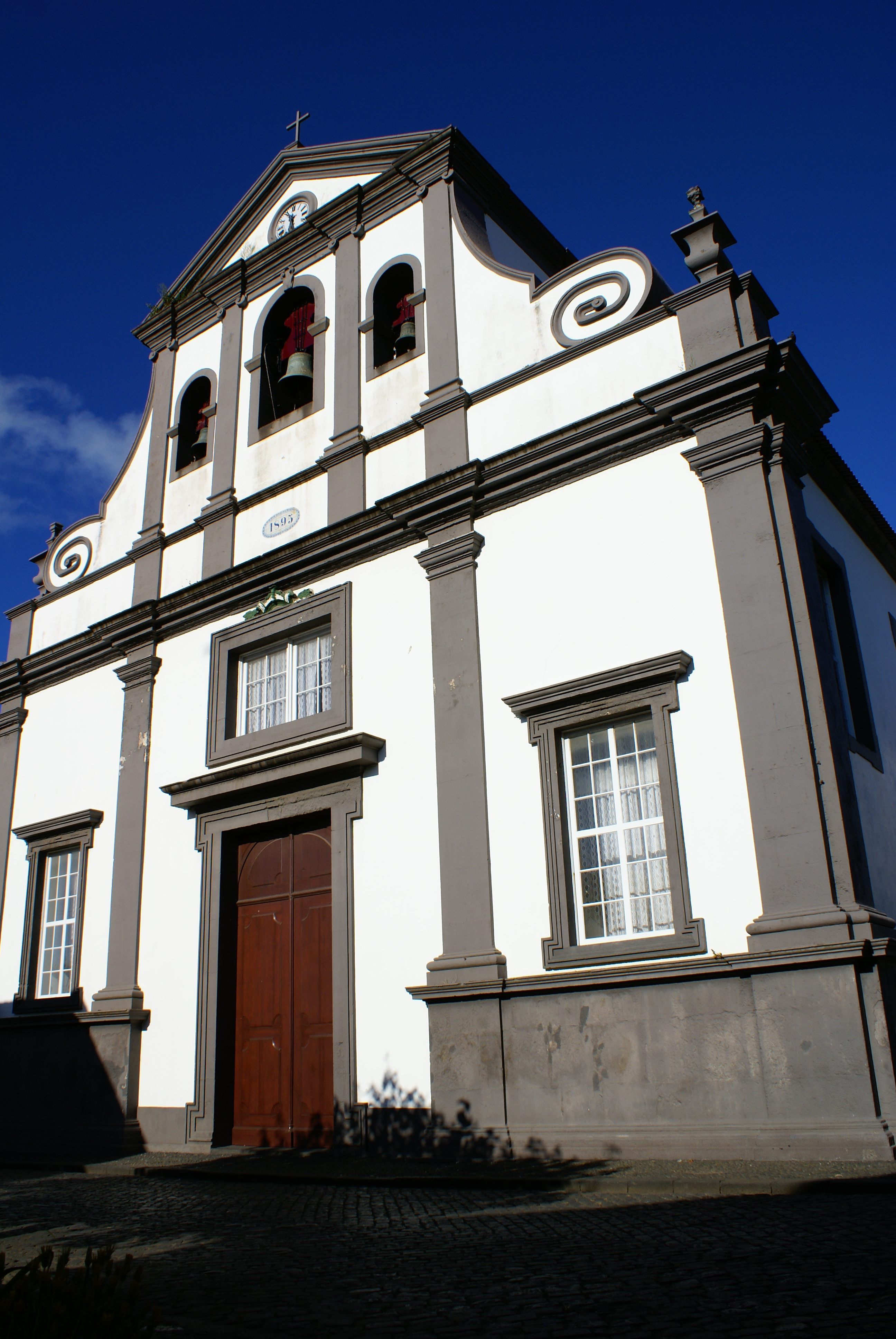 Igreja de São Mateus, fachada, vila da Praia, ilha Graciosa, Açores, Portugal